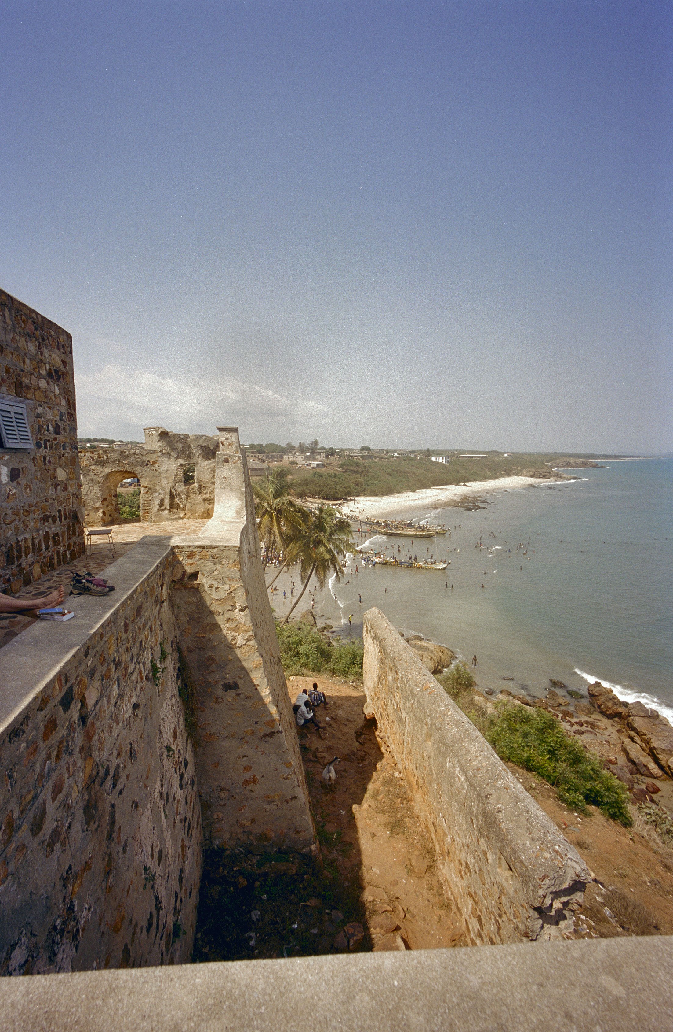 Fort Good Hope: Zicht op bastion rechts achter en strand, vanaf achterzijde muur (opmerking: Ghana reis Loek Tangel)